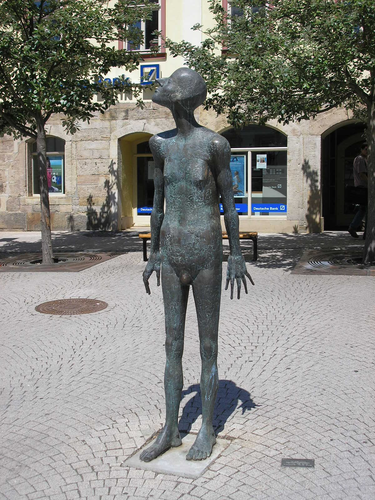 Eine Bronzeplastik des "1. Ilmenauer Kunstweges" am Apothekerbrunnen in Ilmenau (Thüringen). Bildhauer: Volkmar Kühn.